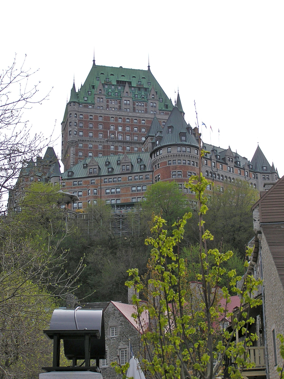 Chateau Frontenac von der Unterstadt aus gesehen